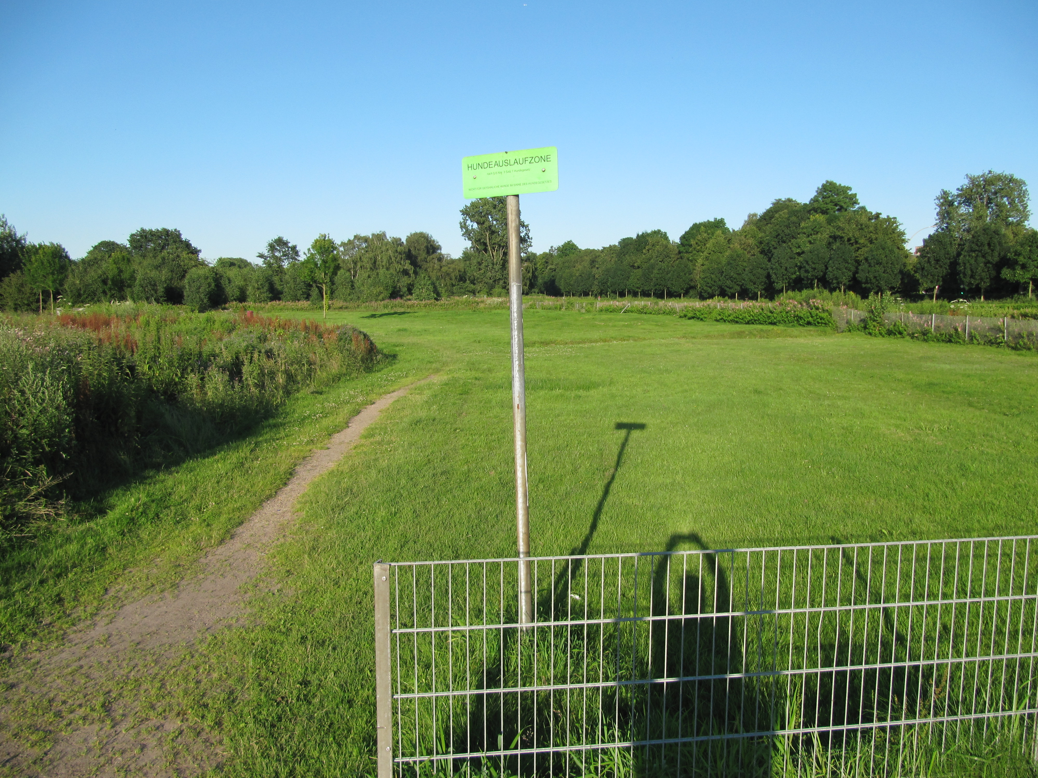 Hundeauslaufzone Hamburg-Horn